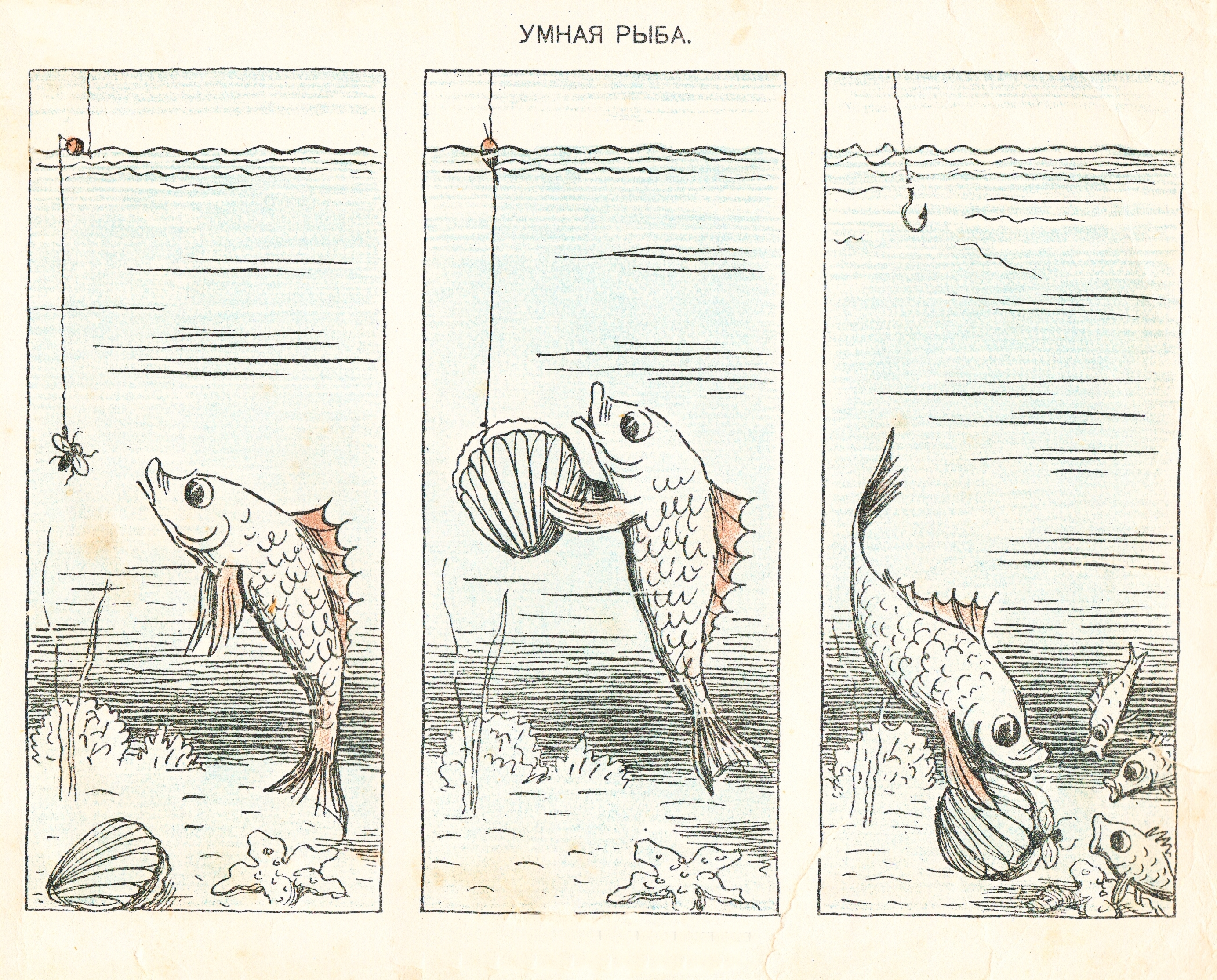 Рассказы в картинках. 1-е издание, Детиздат ЦК ВЛКСМ, Ленинград